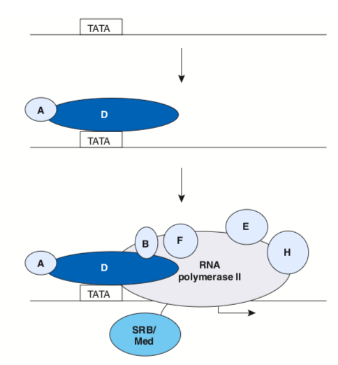 Representação esquemática do mecanismo de funcionamento de fatores de transcrição